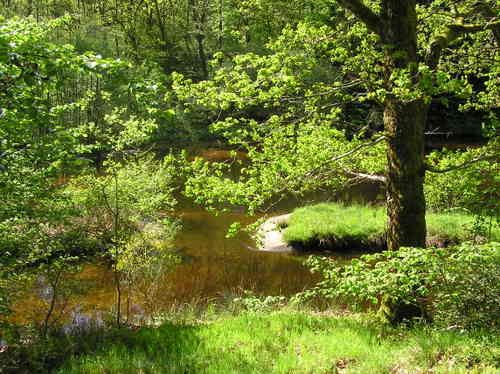 Ruisseau du Langladure au Moulin